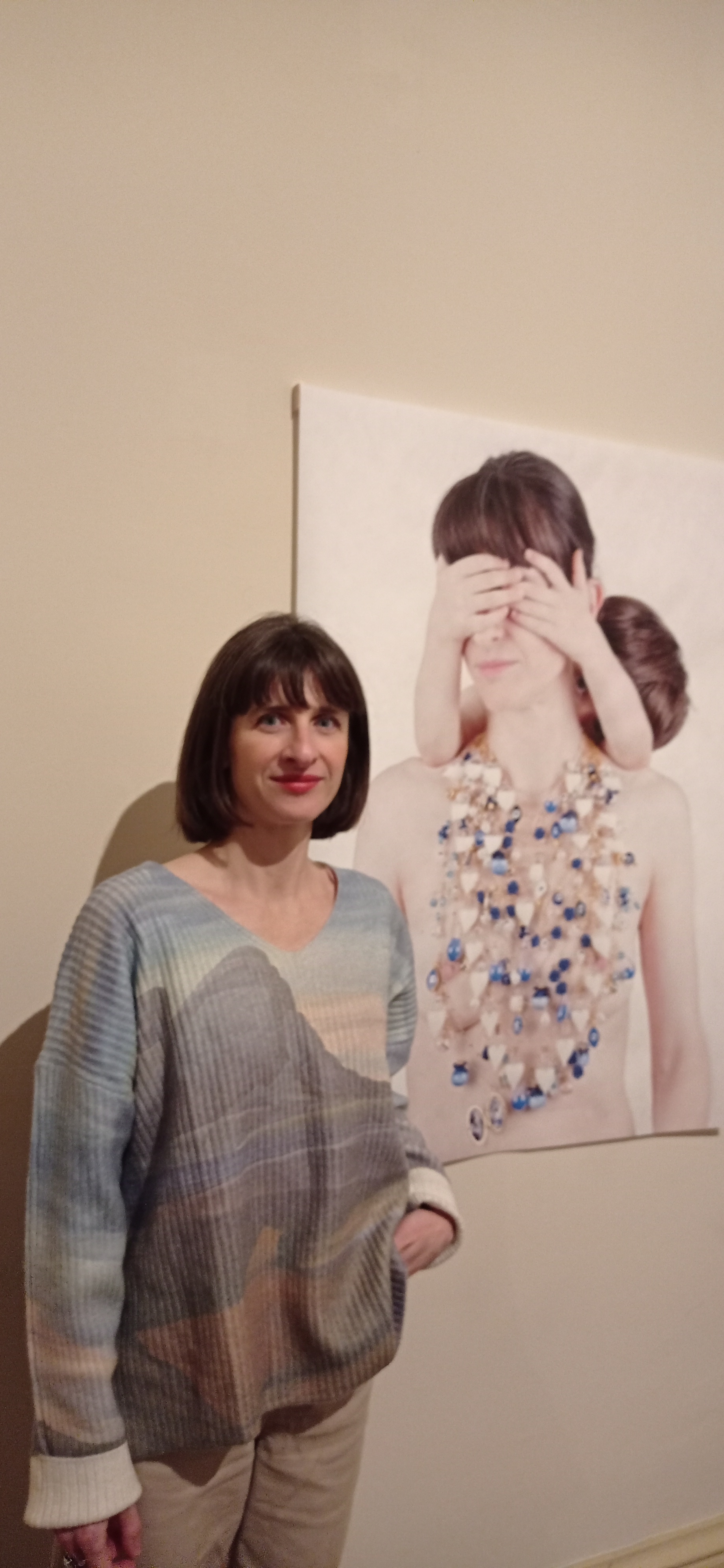 at the Museo Nacional Thyssen-Bornemisza